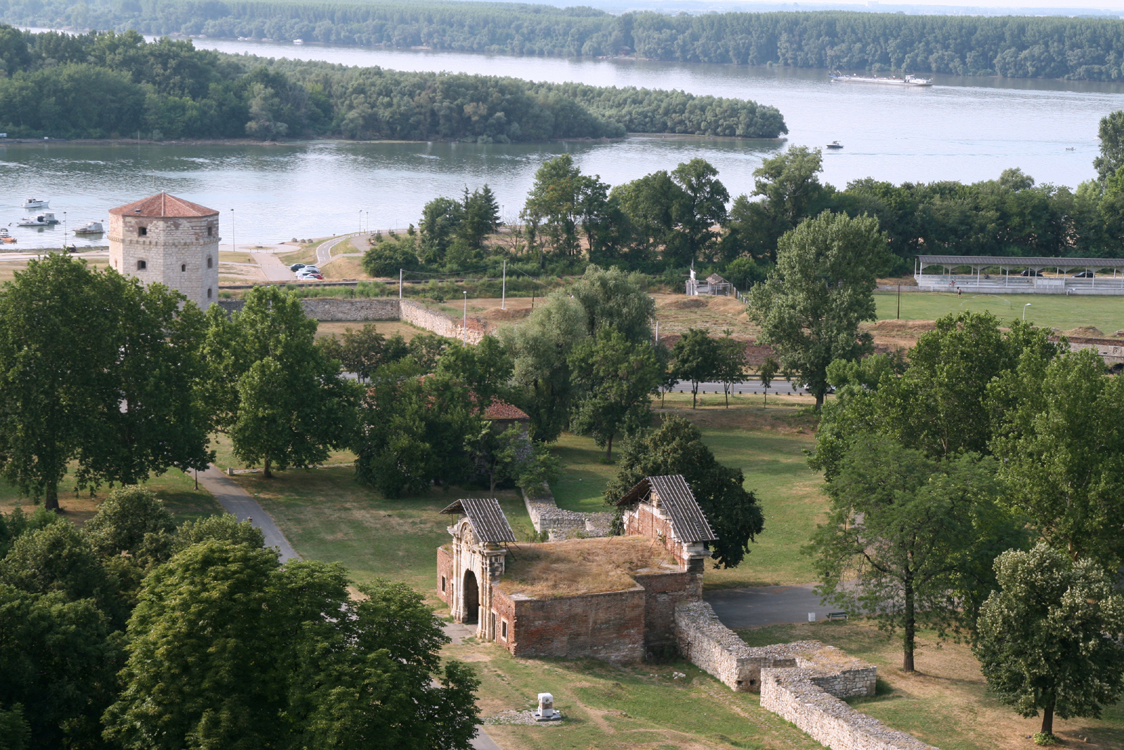 Forteresse de Belgrade et confluence de la Sava et du Danube à Belgrade